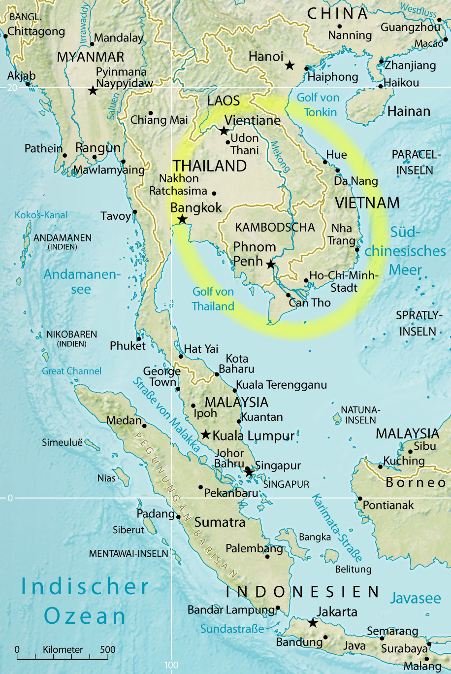 Karte der Indochinesischen Halbinsel